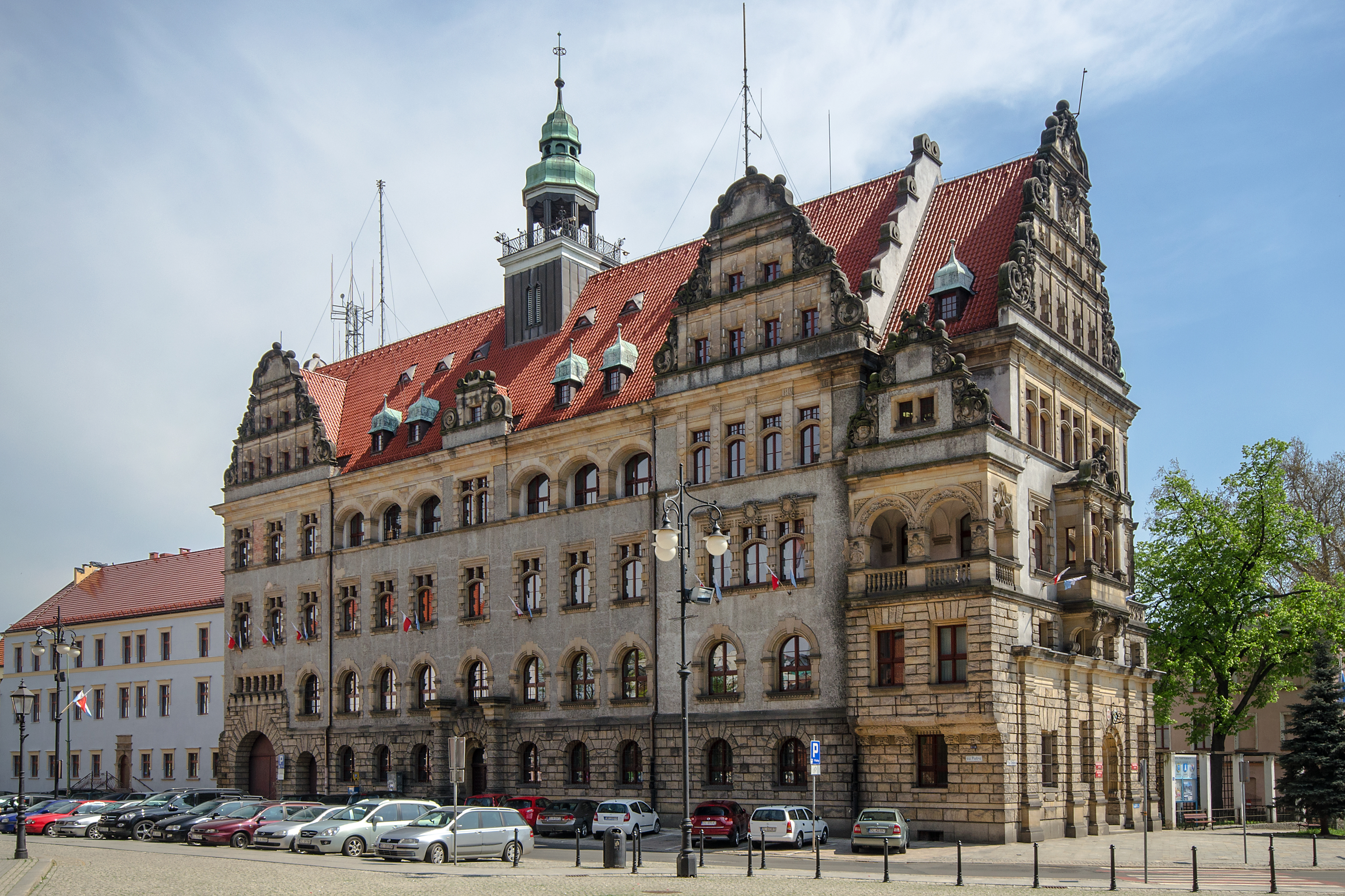 Legnica, nowy ratusz, pocz. XX